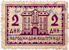 Поштанска маркица Народни дом Власотинце. Штампана у периоду између 1932 и 1934 године поводом освестања изградње винског подрума и споменика у центру.